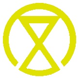 宮崎 市章